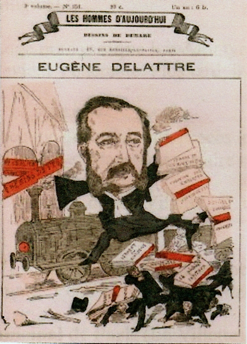 Eugène DELATTRE, né à Ramburelles (Somme, France). Première page du journal «Les hommes d'aujourd'hui» N° 151, vers 1882.